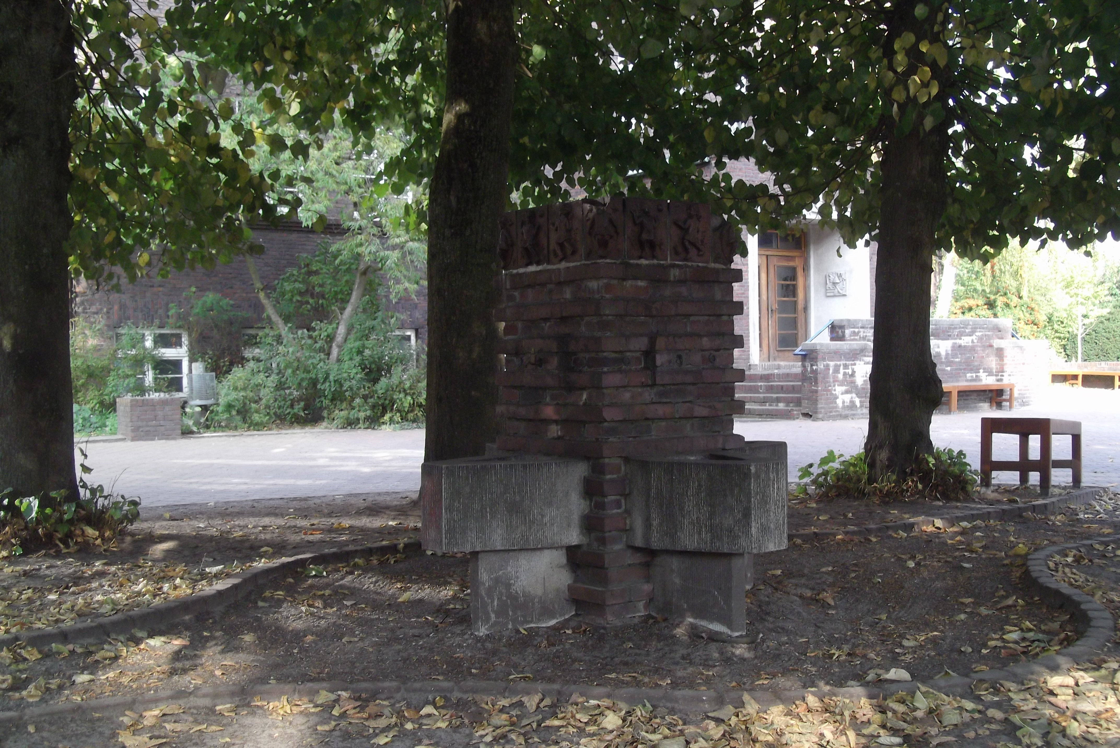 Freie Waldorfschule Oldenburg, Schulbrunnen. Der Schulbrunnen wurde 1927/28 von der Bildhauerin Elsa Oeltjen-Kasimir (1887-1944) entworfen